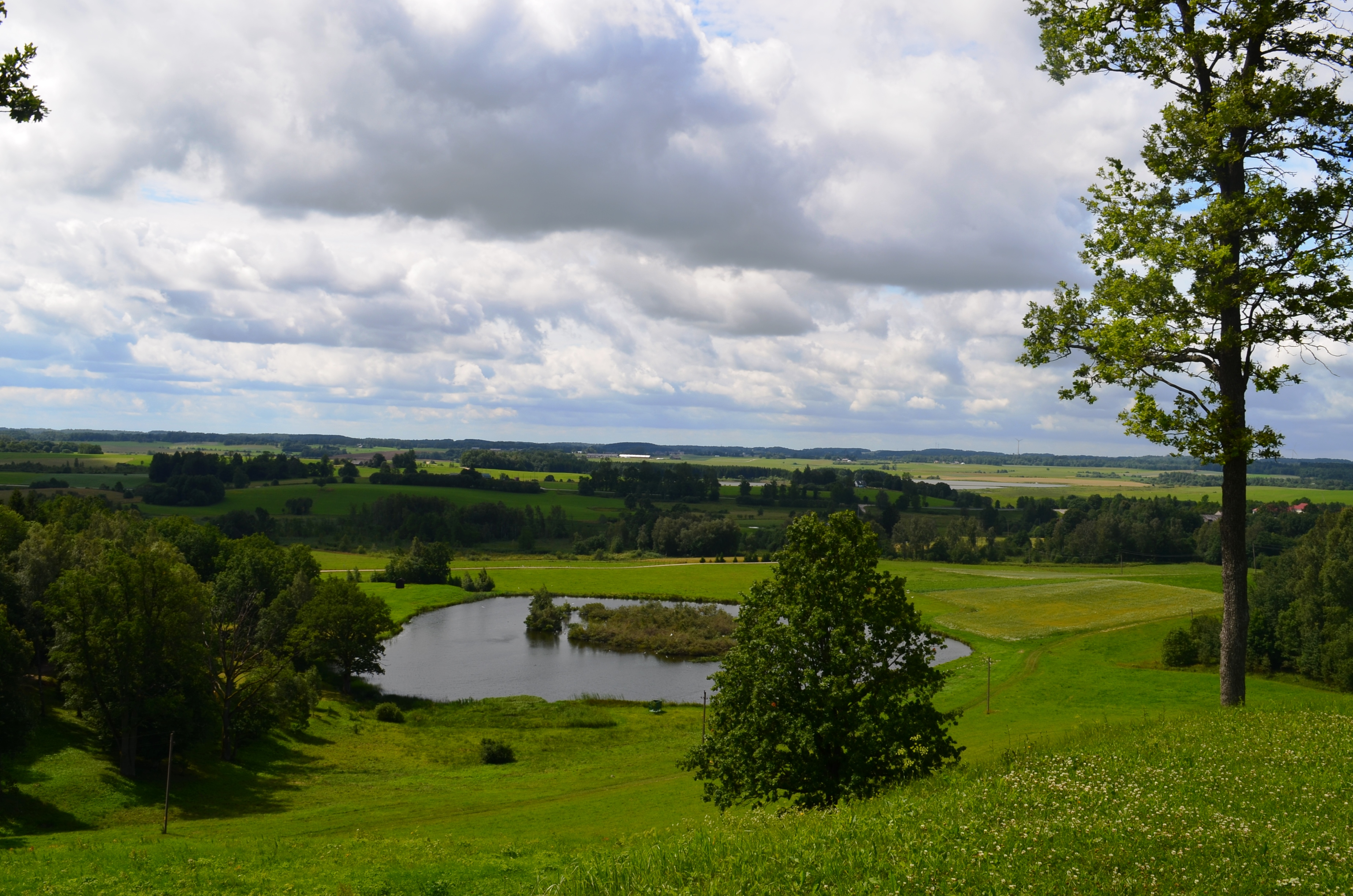 Vaizdas pietuosna nuo Bilionių piliakalnio, Šilalės r. Žemaitėška: Pavēkslos veizont i pėitus nuo Bėliuoniu pėliekalnė, Šėlalės raj.